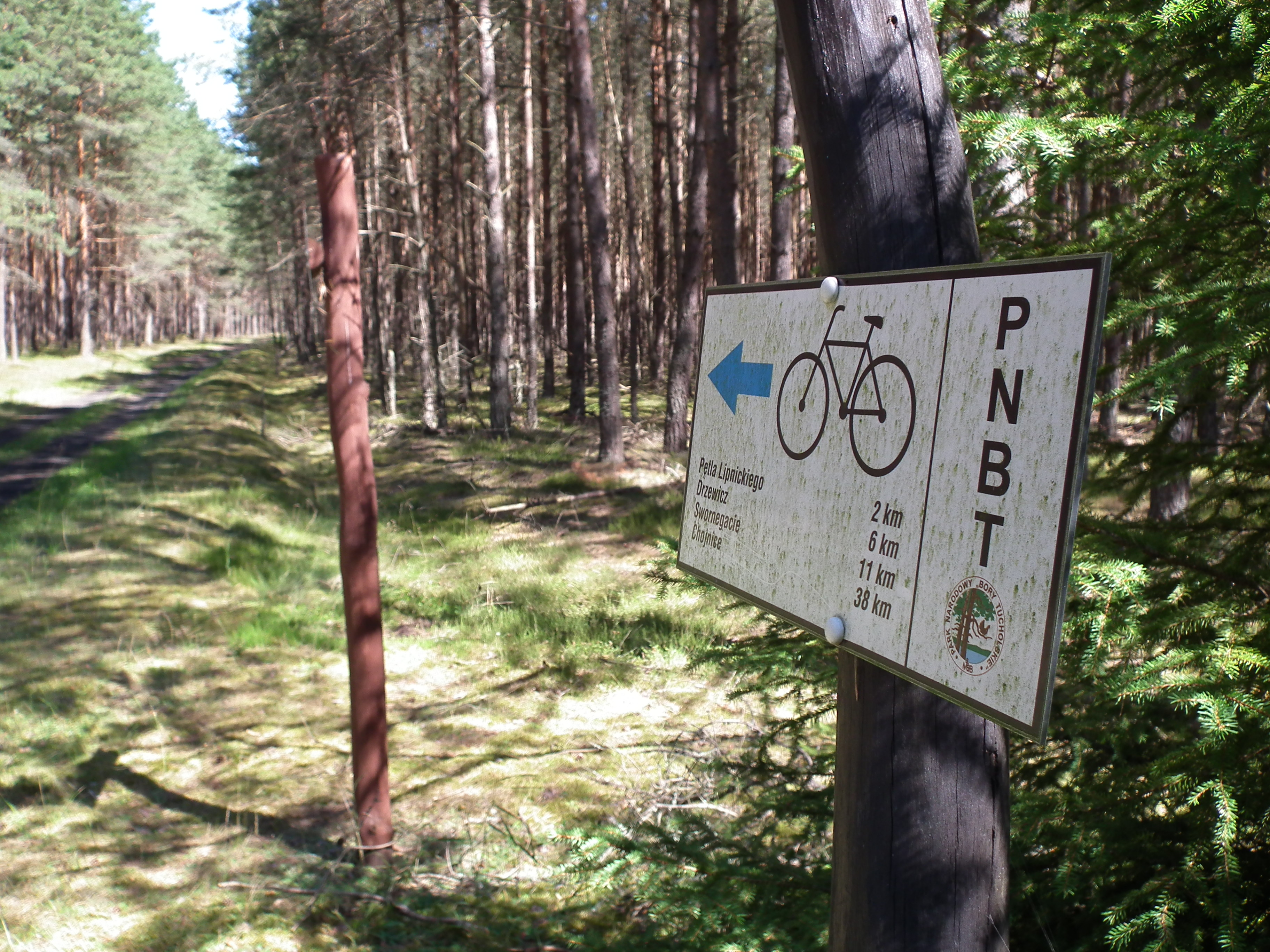 Szlaki turystyczne w Parku Narodowym Bory Tucholskie.